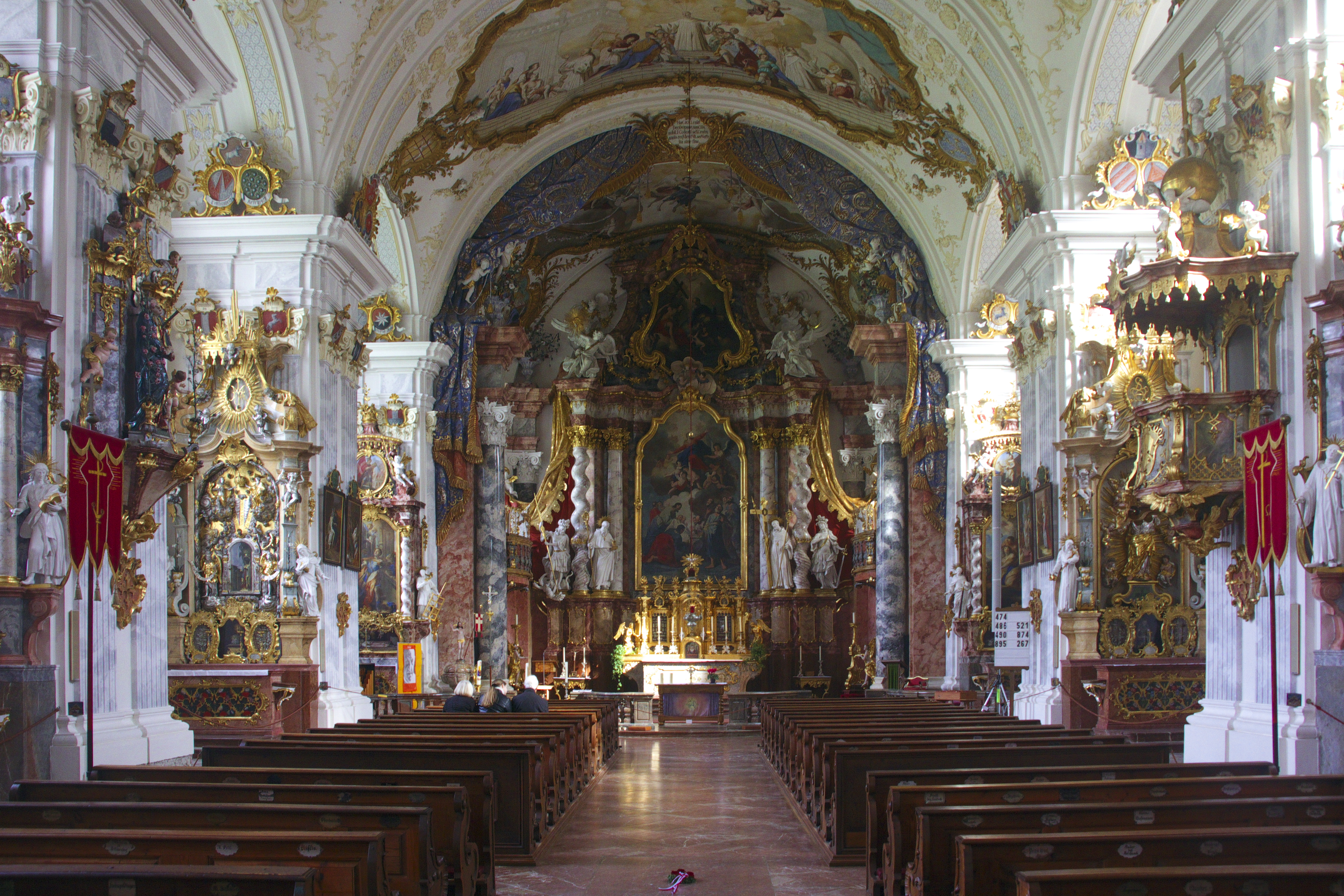 Kloster Raitenhaslach Kirche Innenraum Blick zum Altar